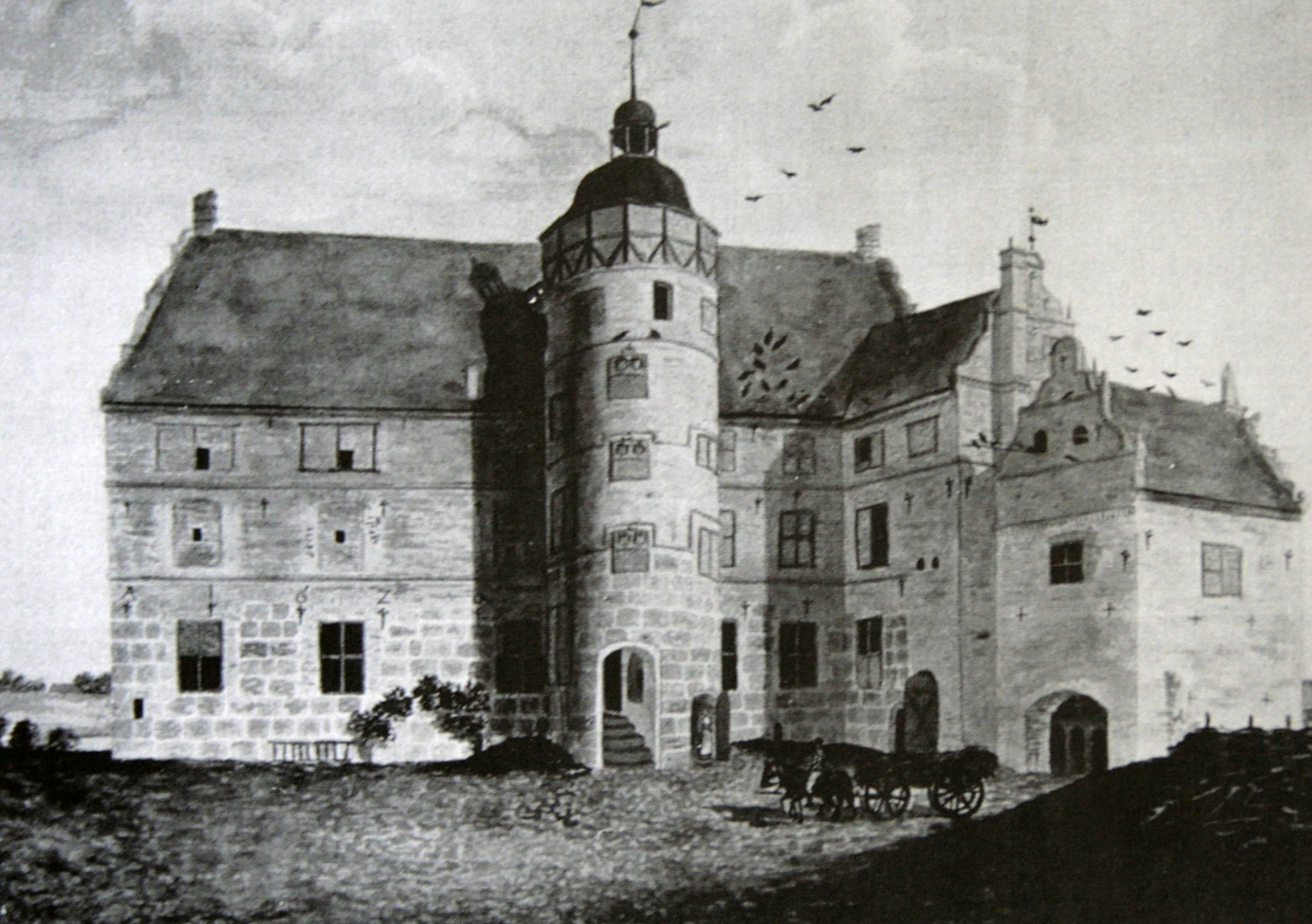 Schloss Ulrichshusen bei Schwinkendorf, Mecklenburg-Vorpommern, Deutschland, auf einer Gouache um 1730